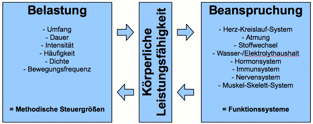 Belastungs-Beanspruchungs-Modell modifiziert nach Kuno Hottenrott, Thomas Gronwald: Ausdauertraining in Schule und Verein. Hofmann, Schorndorf 2009, ISBN 978-3-7780-0381-7, S. 50